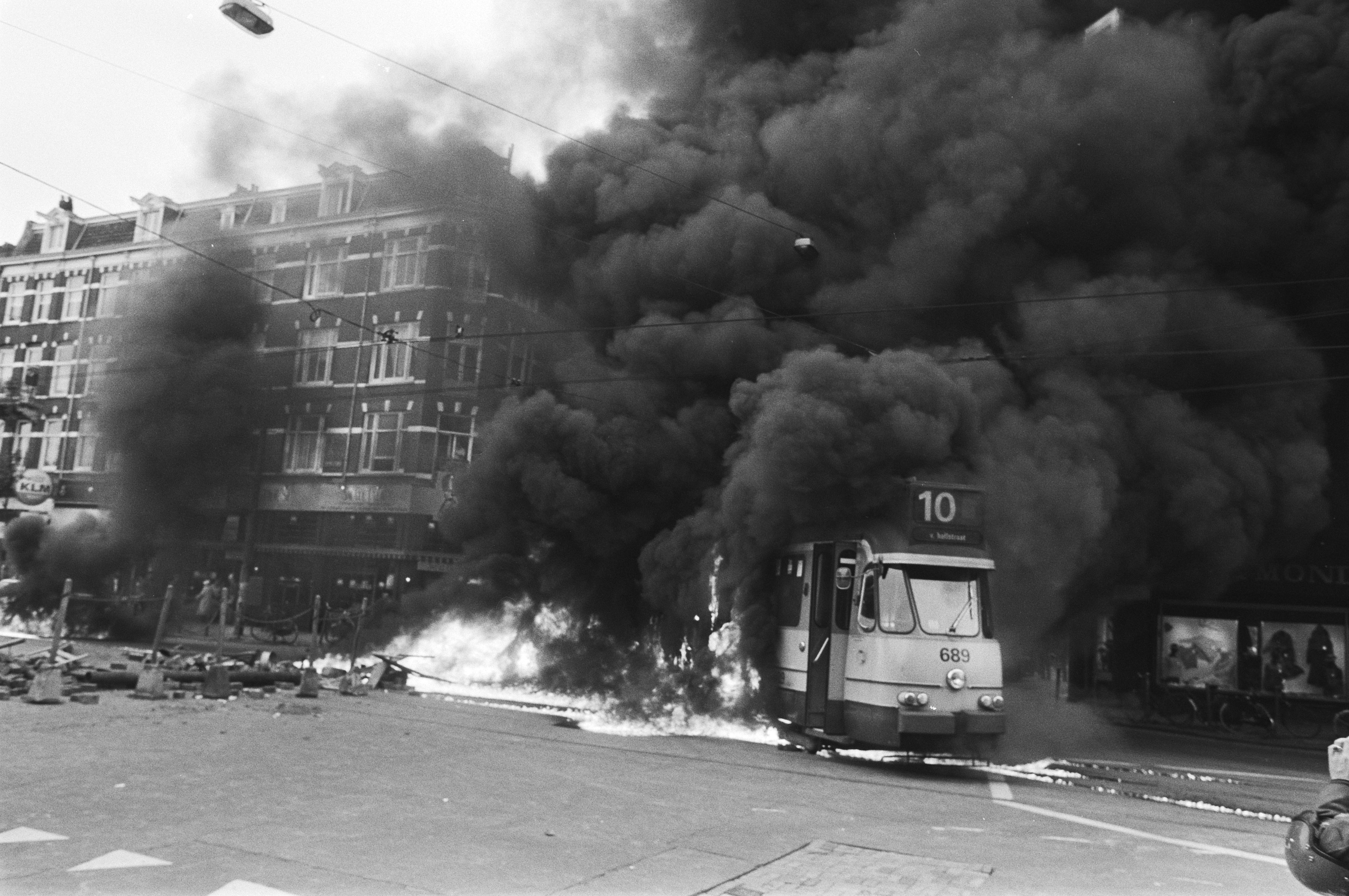 Collectie / Archief : Fotocollectie Anefo Reportage / Serie : Rellen rond de ontruiming van kraakpand "Lucky Luijk" in Amsterdam Beschrijving : Brandende tram (nr. 689) in de Van Baerlestraat Datum : 11 oktober 1982 Locatie : Amsterdam, Noord-Holland Trefwoorden : branden, rellen, rook, trams Fotograaf : Bogaerts, Rob / Anefo Auteursrechthebbende : Nationaal Archief Materiaalsoort : Negatief (zwart/wit) Nummer archiefinventaris : bekijk toegang 2.24.01.05 Bestanddeelnummer : 932-3602